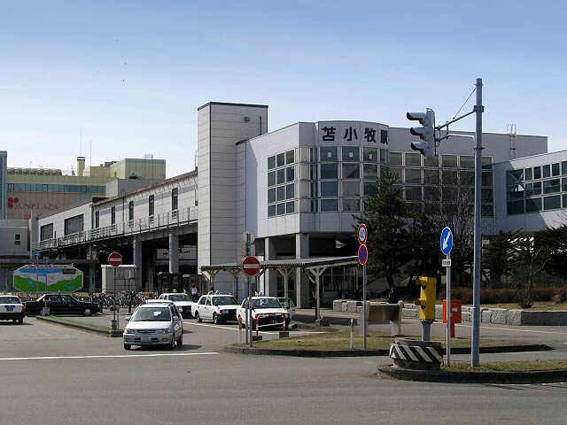 Tomakomai Station in Muroran Main Line, Japan